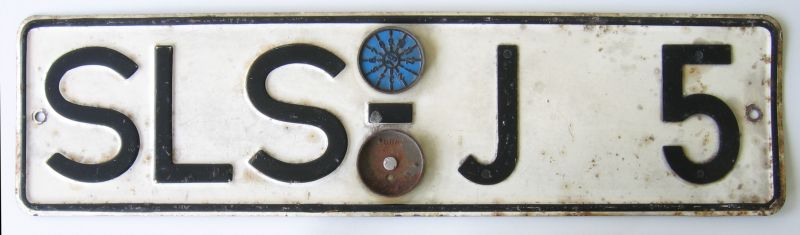 Deutsches PKW-Hecknummernschild aus Saarlouis mit DIN-Schrift, Anfang 1960er Jahre (Besonderheit: das Unterscheidungszeichen ist geprägt, die Erkennungsnummer ist aus Kunststoff-Lettern aufgenietet; diese Herstellungsvariante war teilweise bis in die 1970er Jahre üblich)